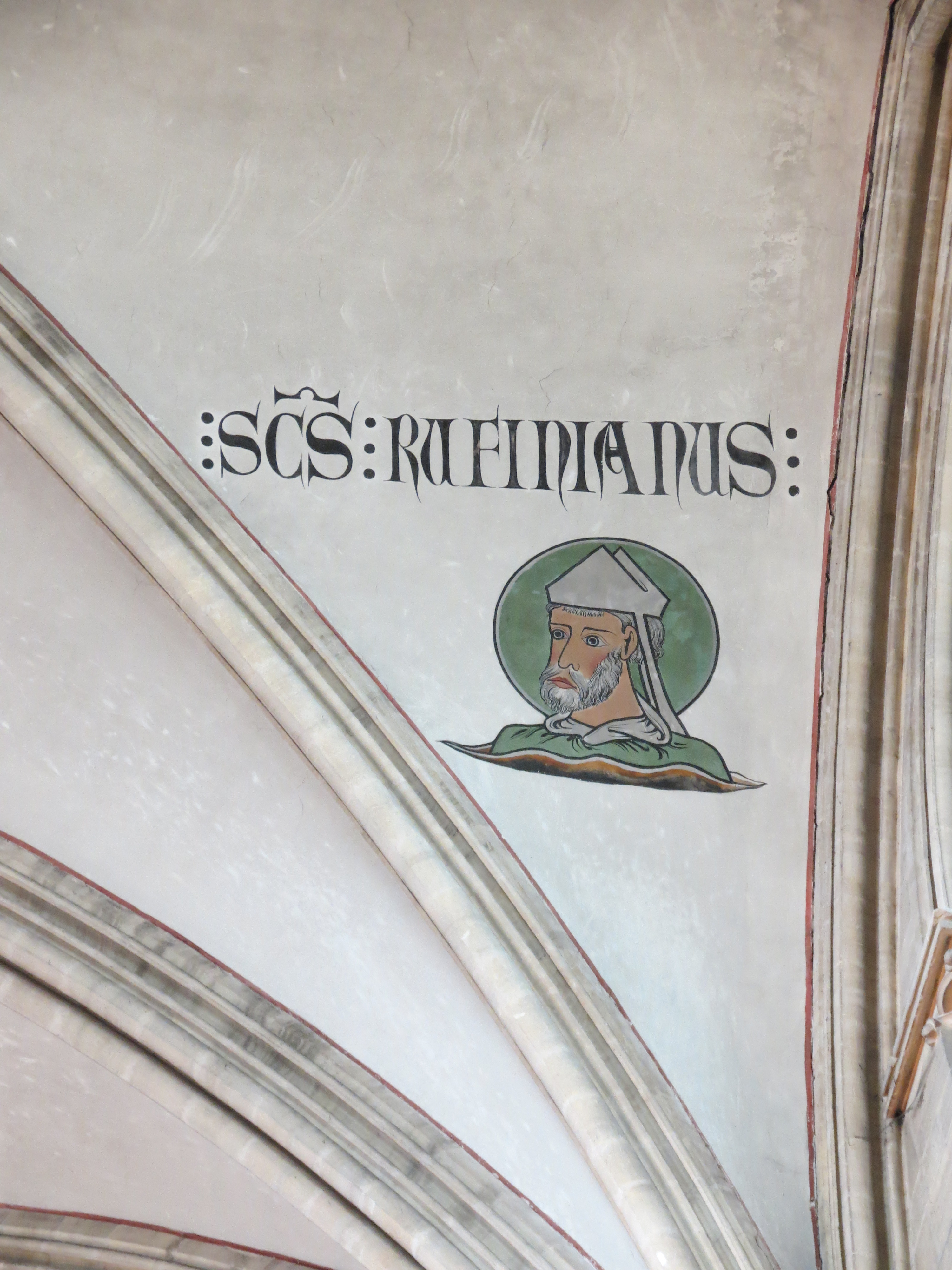 Peinture de Saint-Rufinien sur une des voûtes du chœur de la cathédrale de Bayeux.